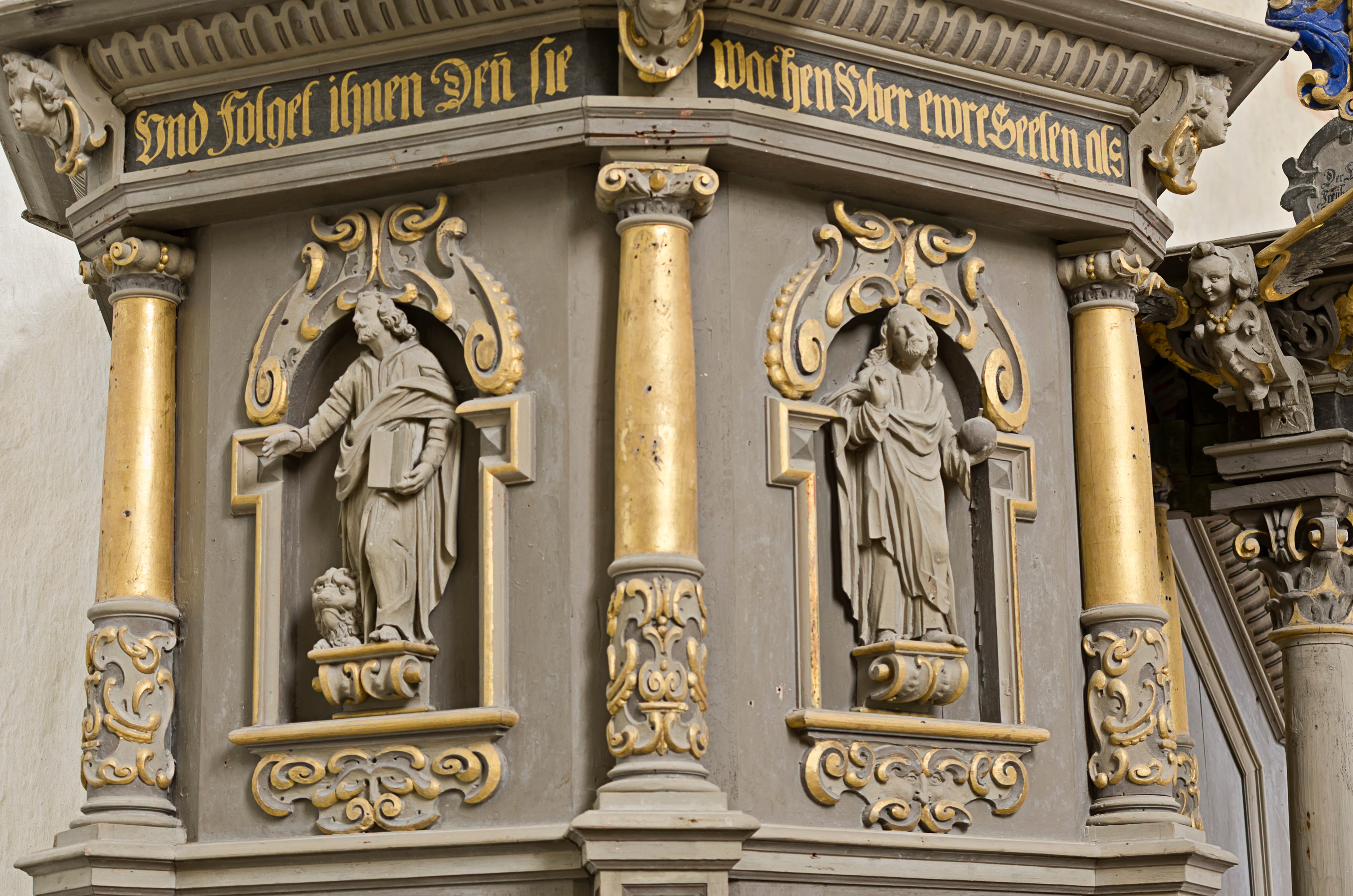 Kantsel Ridala kirikus, detail (Elert Thiele, 1656)